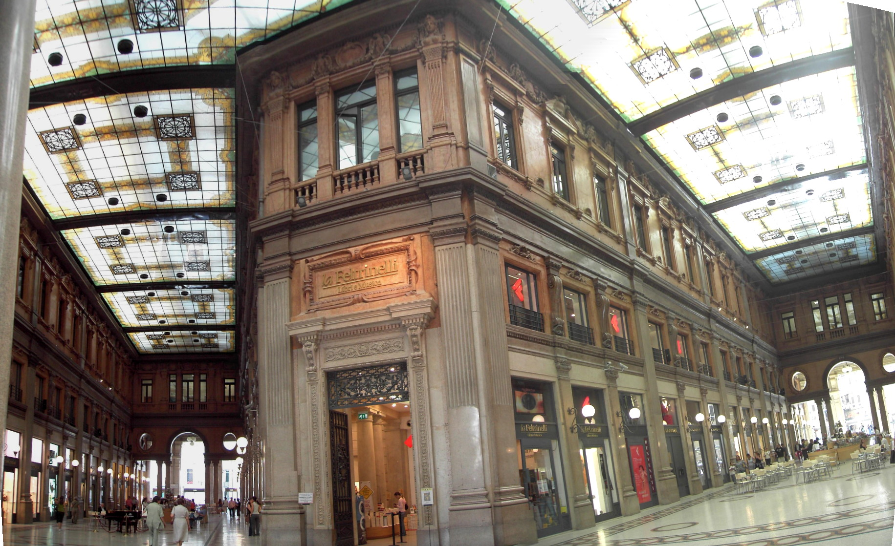 Roma, piazza Colonna: Galleria Alberto Sordi (già Galleria Colonna) - rione Trevi